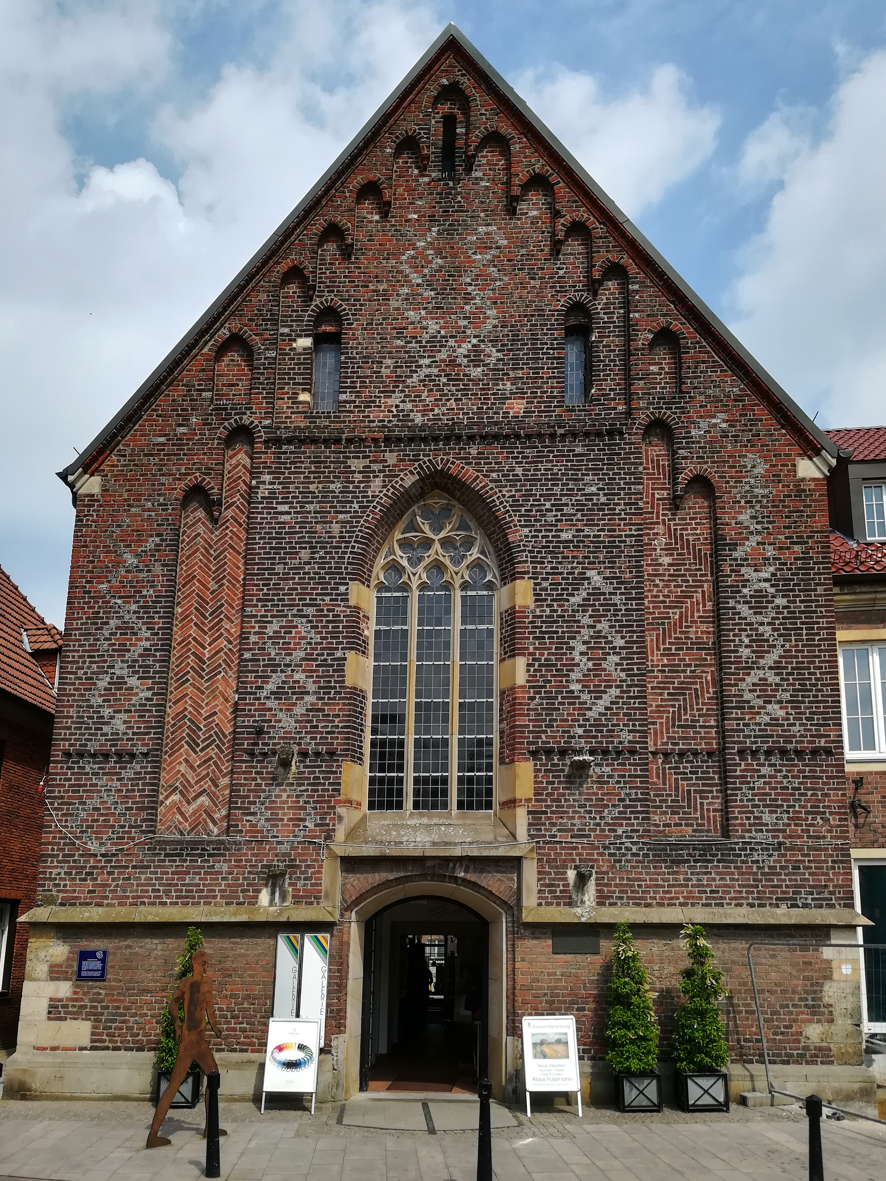 Ehem. Heilig-Geist-Kirche, jetzt Heimatmuseum und Sitzungssaal, ursprünglich Gastkirche des Spitals zum Hlg. Geist, seit 1809 profaniert, einschiffiger Backsteinbau mit Dachreitern, um 1380–1390 erbaut.